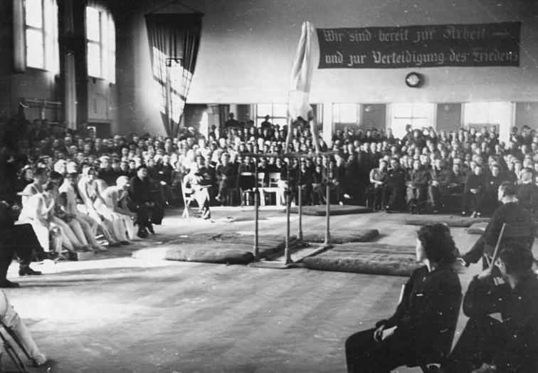 Alfred Müller Illus Th.B.D. 24.10.50 Die Meisterschaften der Deutschen Demokratischen Republik im Geräteturnen fanden am 21. und 22.10.50 in der Sportschule Greiz in Thüringen statt. Der Nachwuchs zeigte hier besonders gute Leistungen. UBz: Altmeister Alfred Müller von der BSG Leuna errang eine Einzelmeisterschaft am Barren mit 19,45 Punkten. Information added by Wikimedia users. slogan on the bannerdeenWir sind bereit zur Arbeit —und zur Verteidigung des FriedensWe are ready to work —and to defend peace